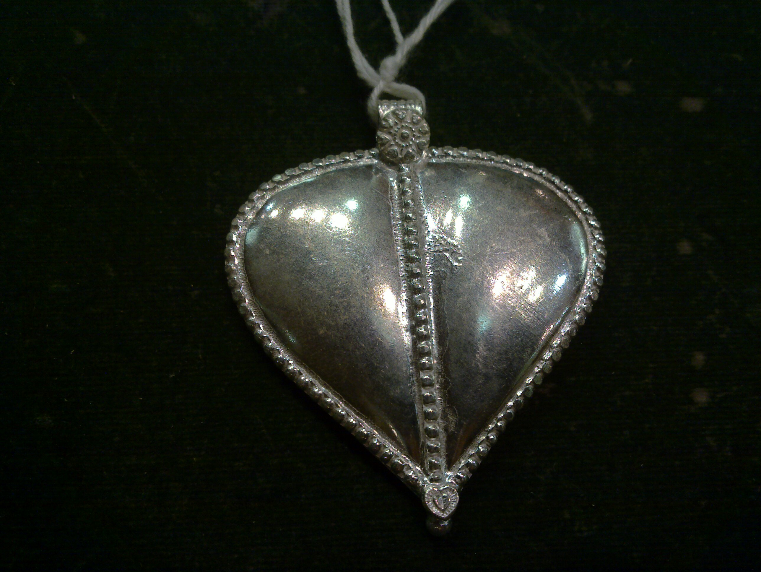 பெண் குழந்தைகளுக்கு அரைஞாணுடன் கோர்த்து அணிவிக்கப்படும் அரைமுடி எனப்படும் அணி